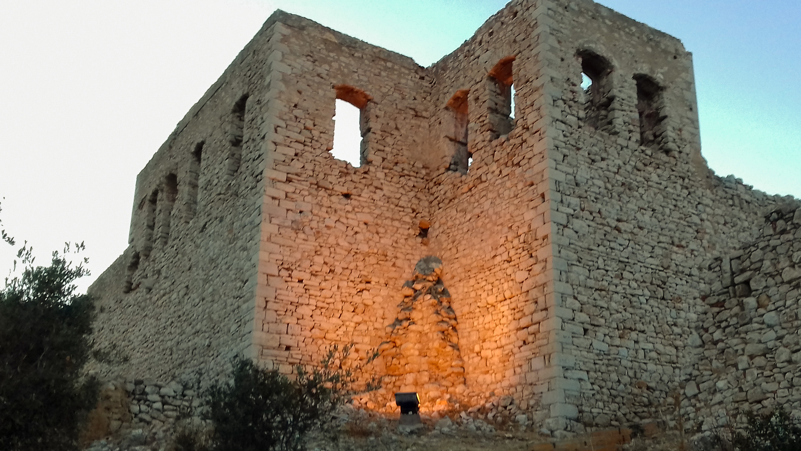 Η ανατολική πλευρά του Κάστρου Παραλίου Άστρους